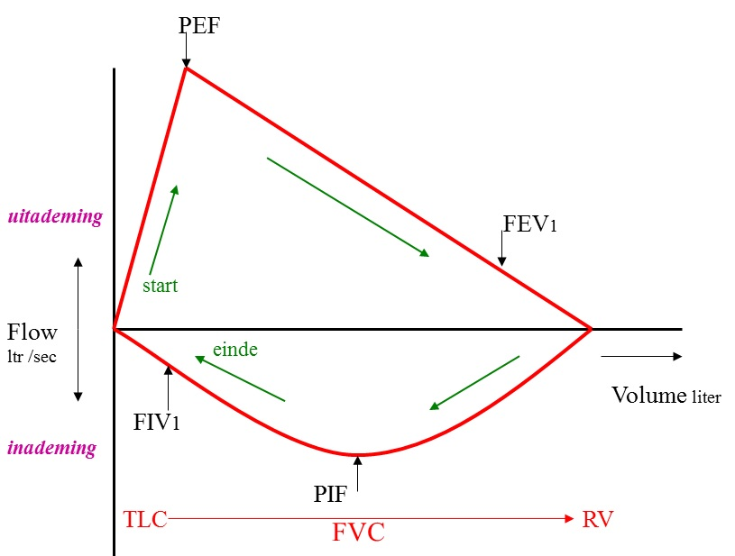 Grafiek van een gezonde flow - volume - curve.